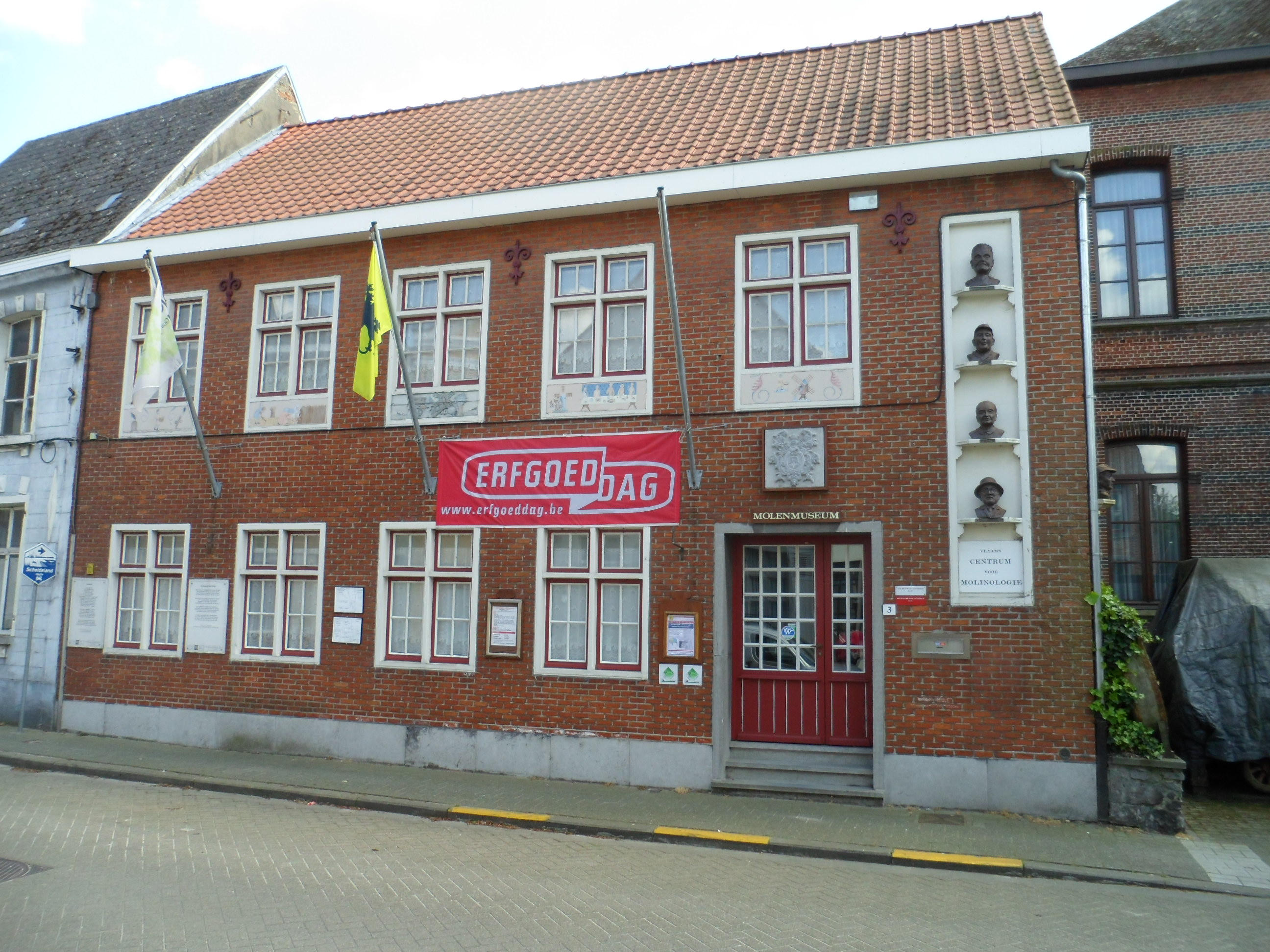 Het gebouw van het molenmuseum